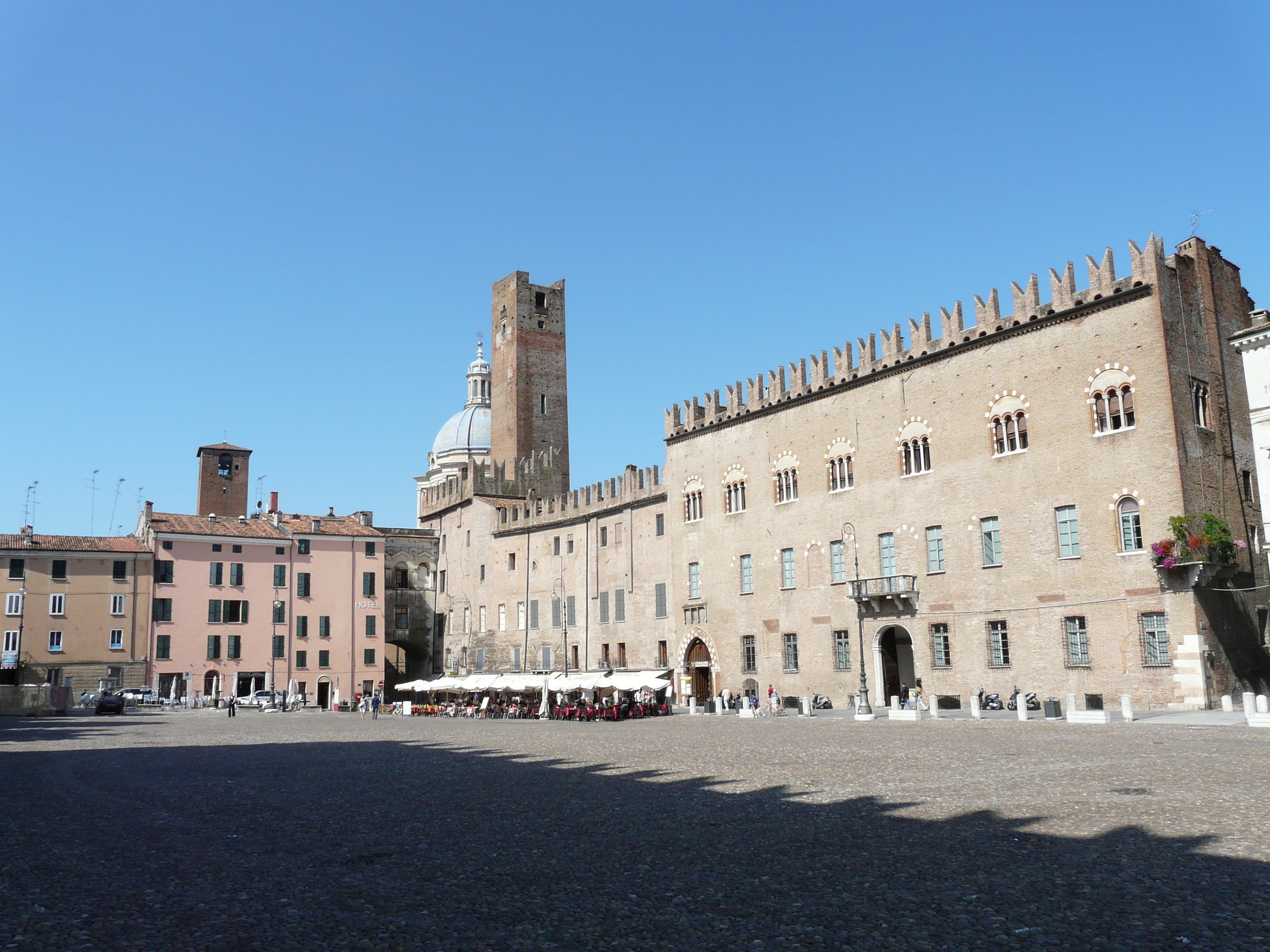 Piazza Sordello, Mantova, Lombardia, Italia